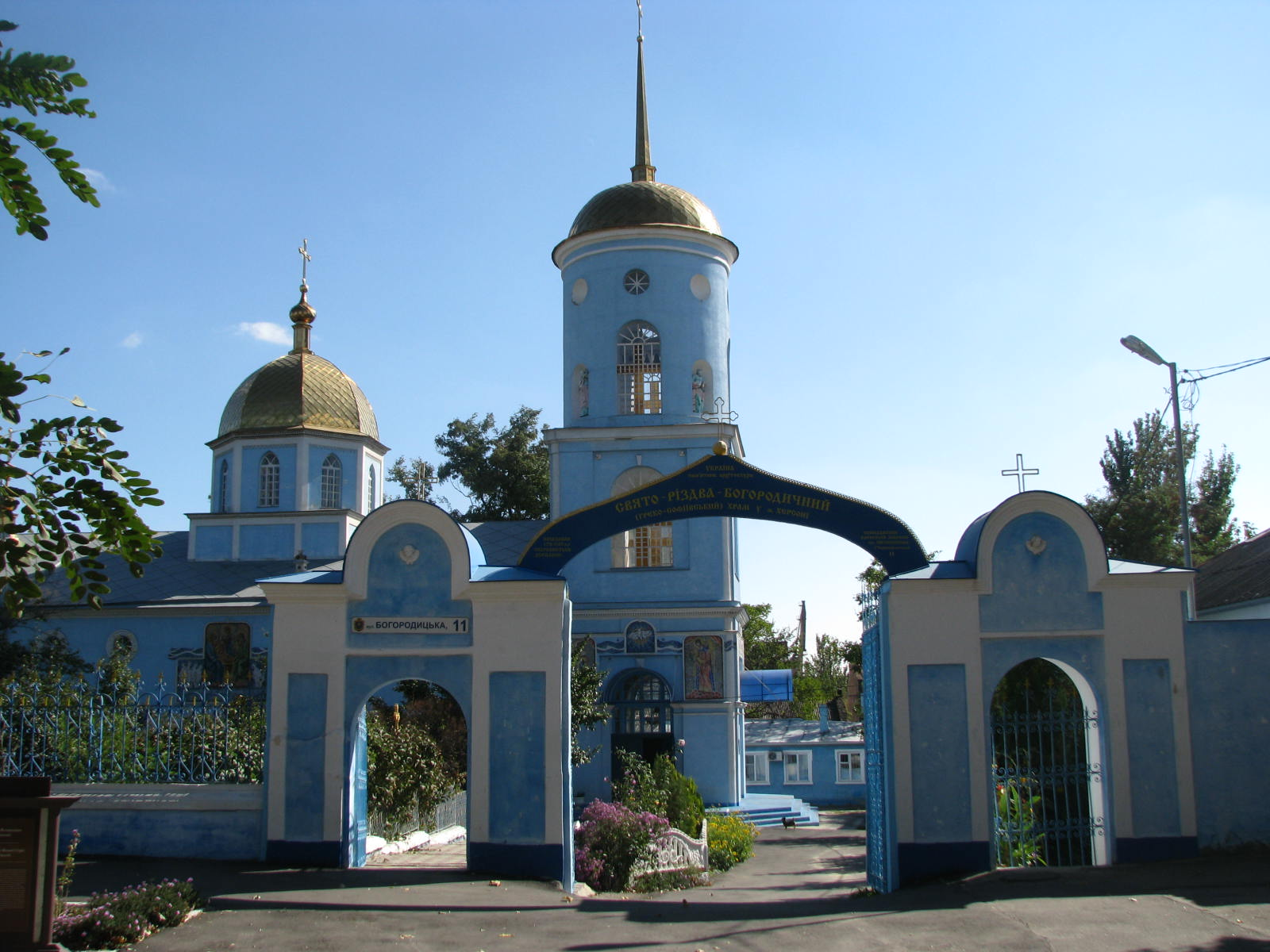 Греко-Софіївська церква (мур.), Херсон, Червонофлотська вул., 13